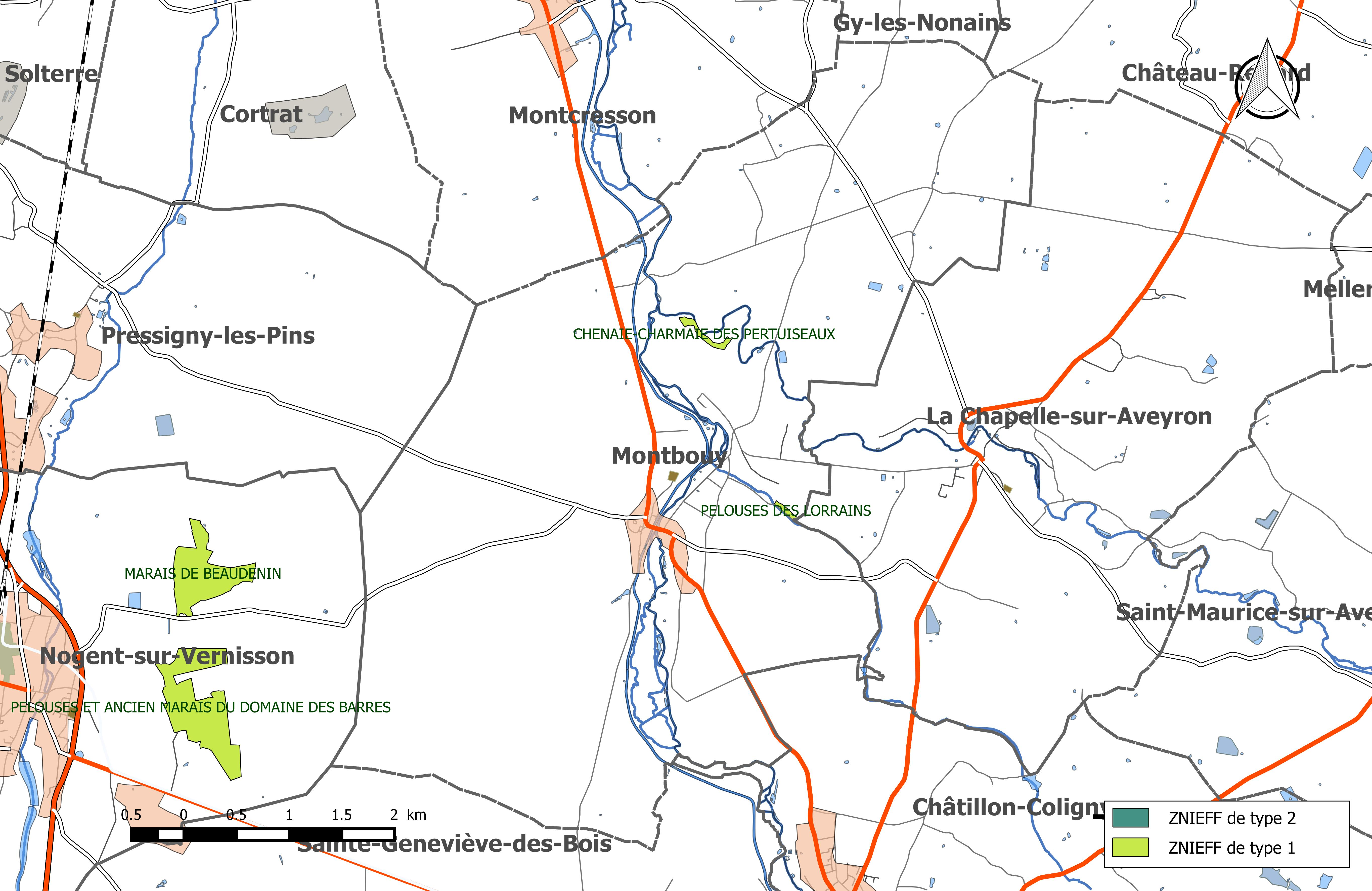 Carte des Zones naturelles d'intérêt écologique faunistique et Floristique (ZNIEFF) de la commune de Montbouy.